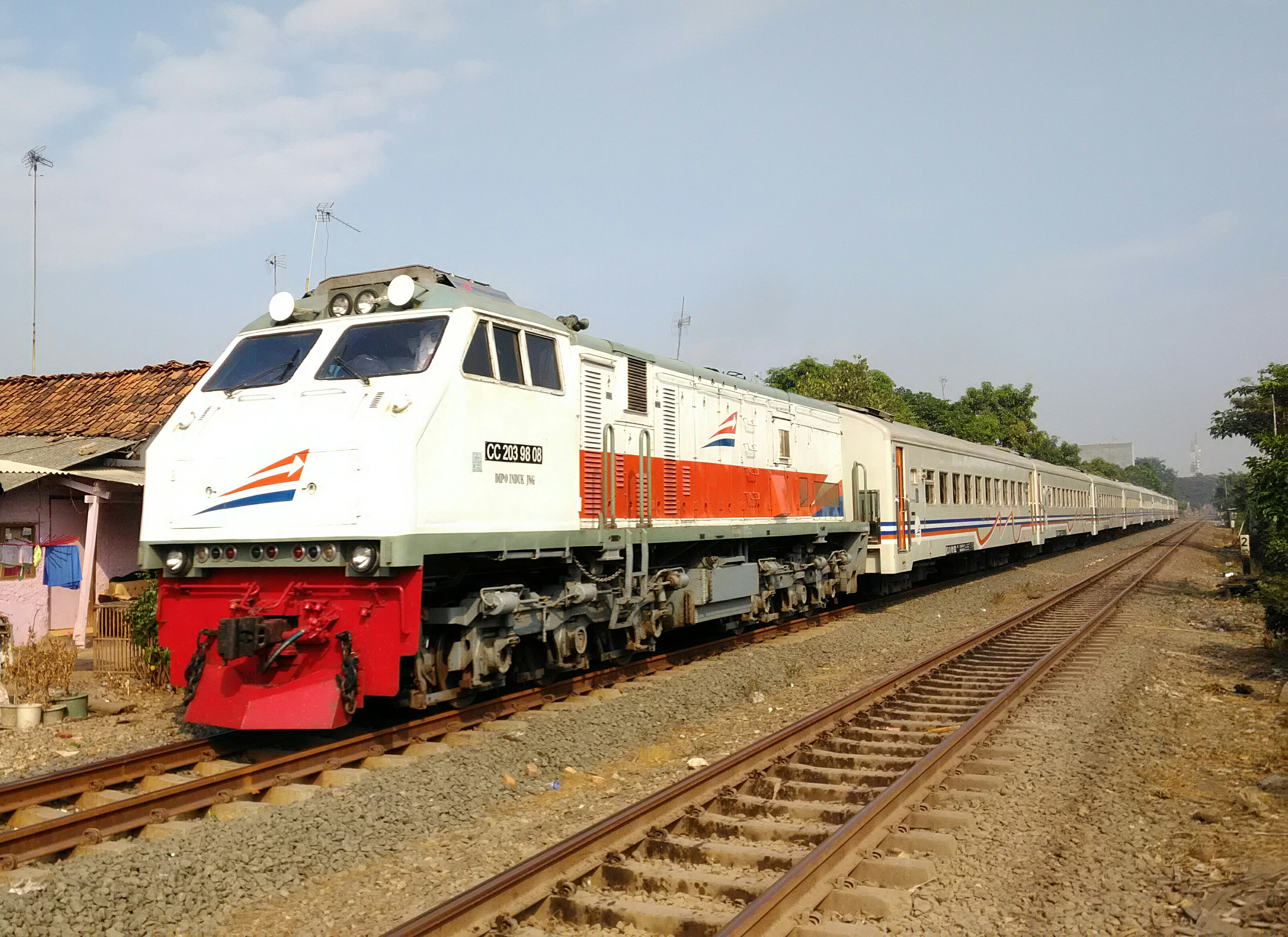 KA Tegal Ekspres